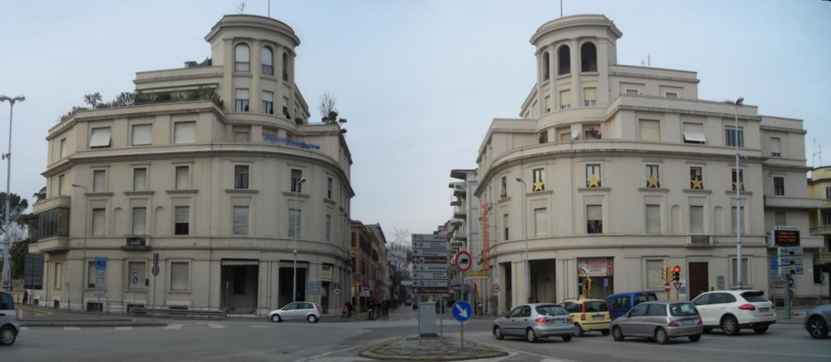 Palazzine Gemelle in Piazzale della Vittoria a Forlì (Italia) che delimitano l'ingresso del Corso della Repubblica